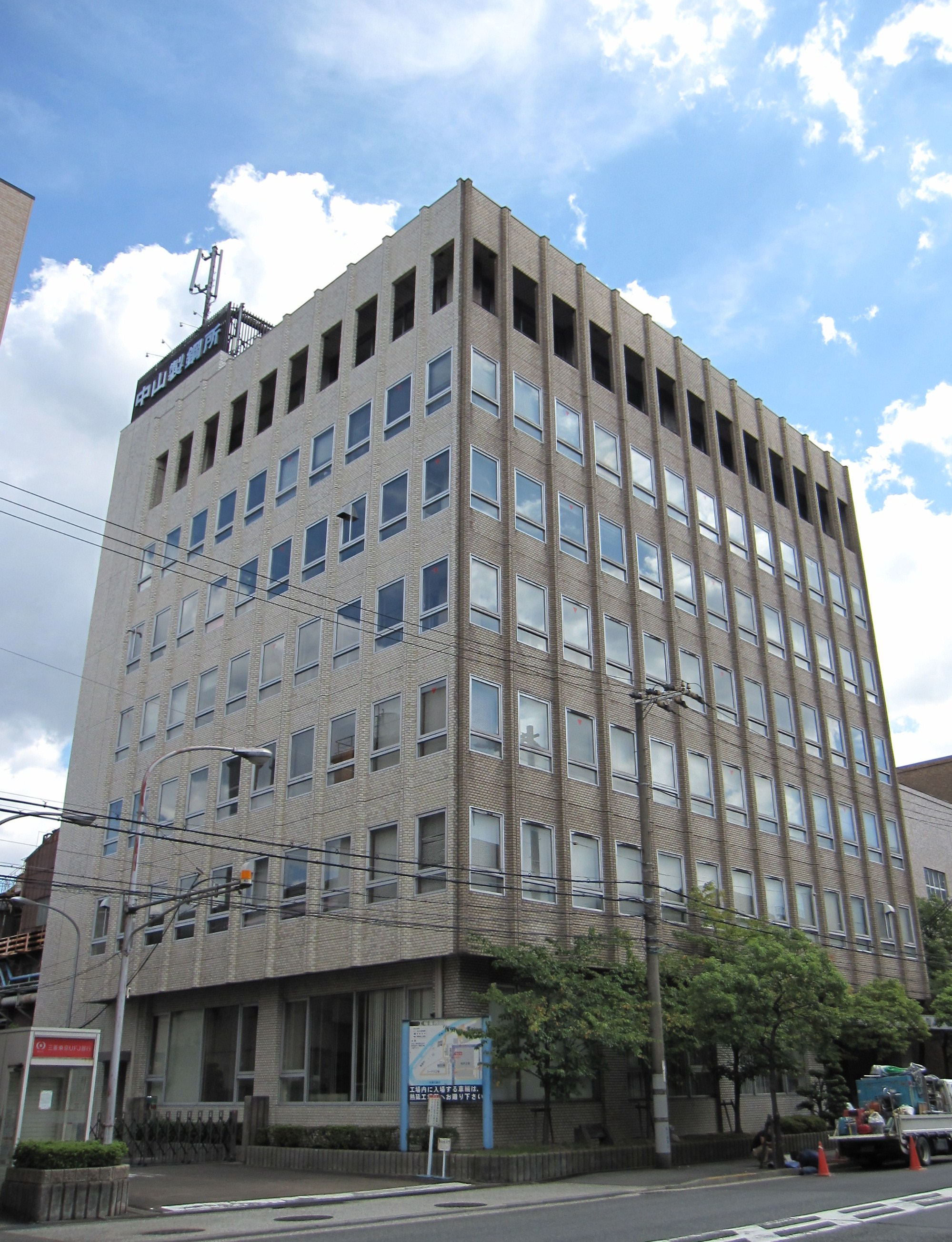 中山製鋼所本社